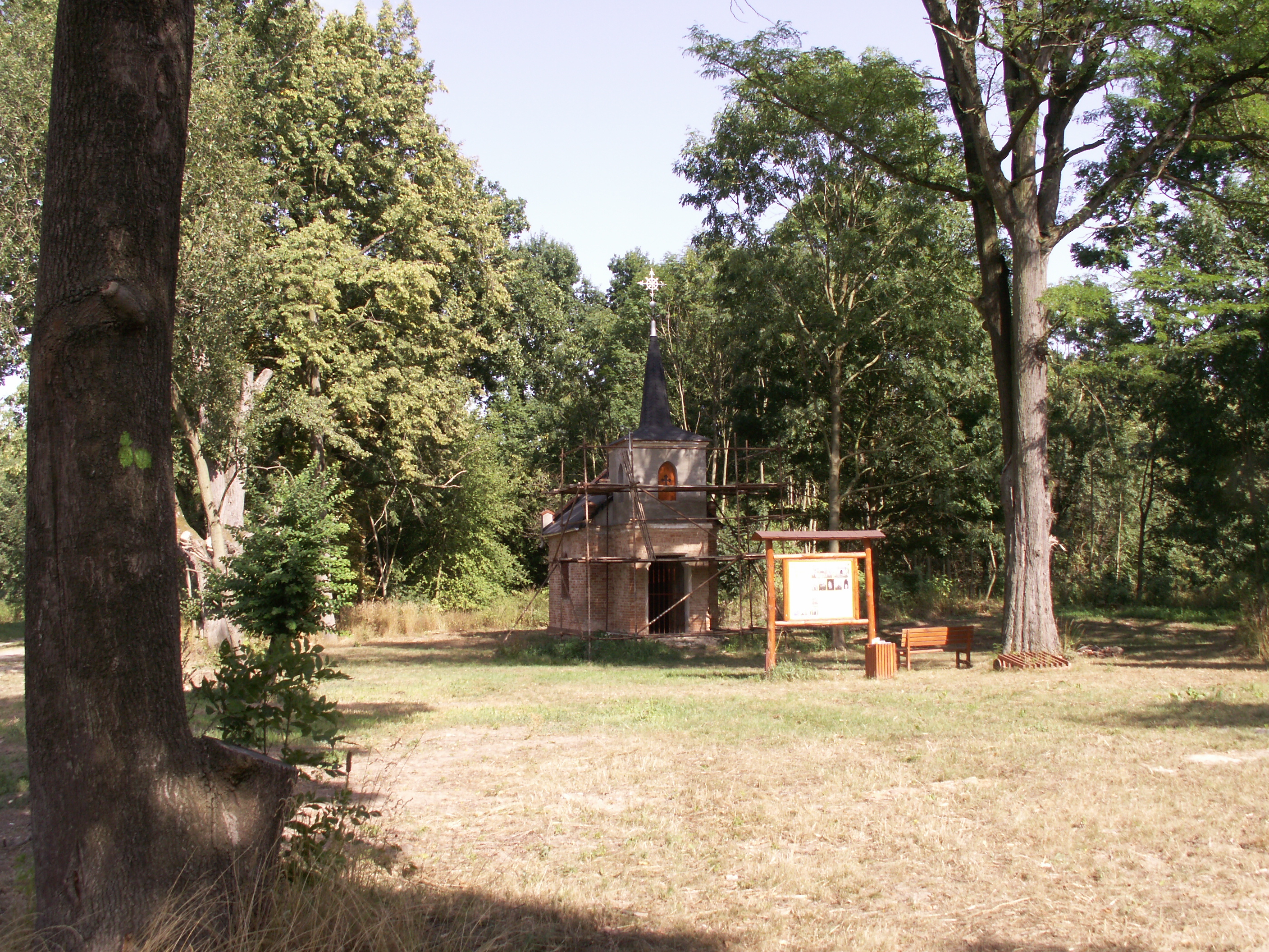 Studnice, část obce Osoblaha, okres Bruntál, Moravskoslezský kraj, kaple svatého Linharta